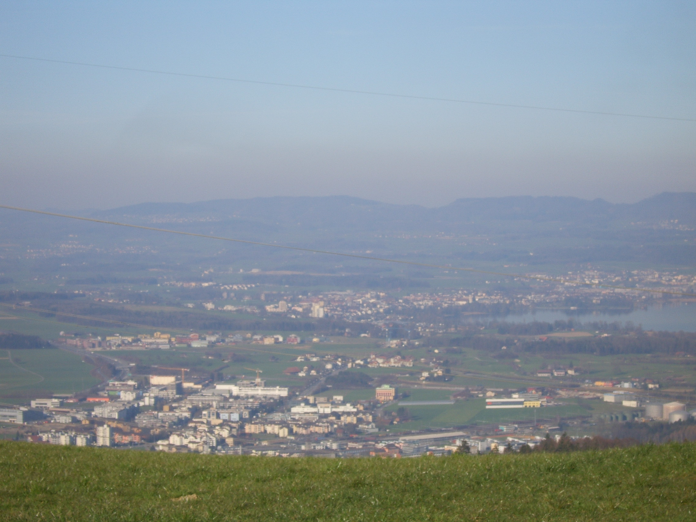 Sicht von Michaelskreuz über Rotkreuz, Cham und Zugersee